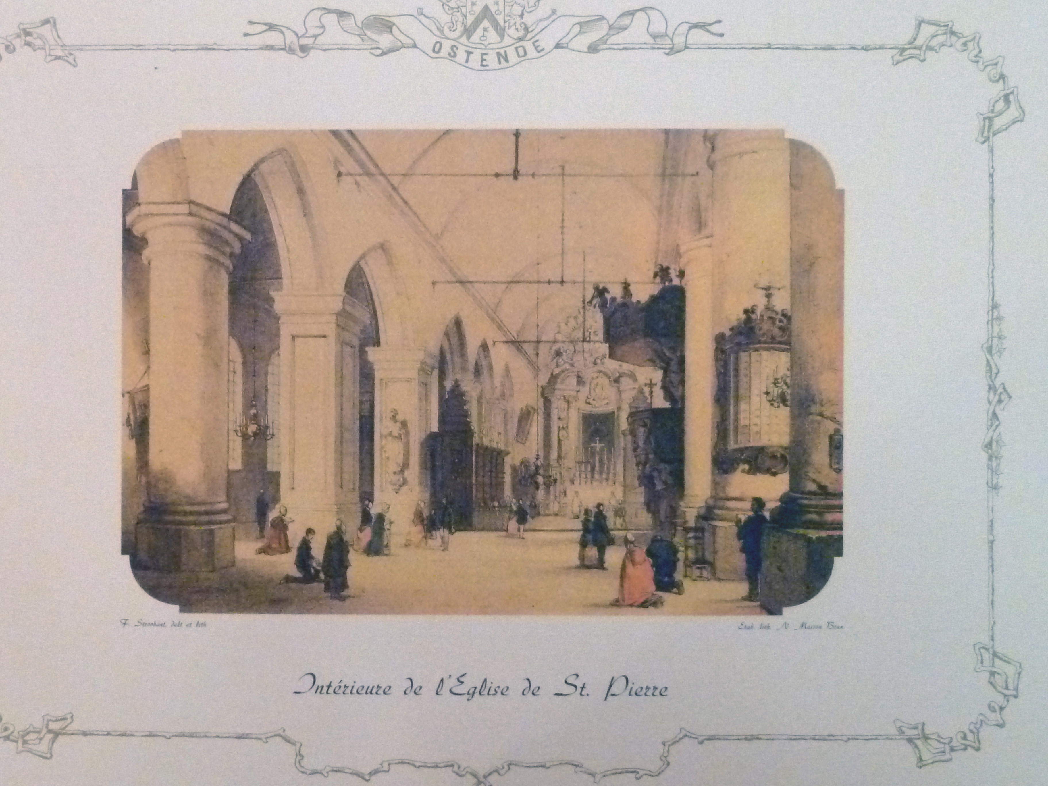 "Interieur van de St. Pieterskerk", 18de-eeuwse gravure (voor 1862); privébezit